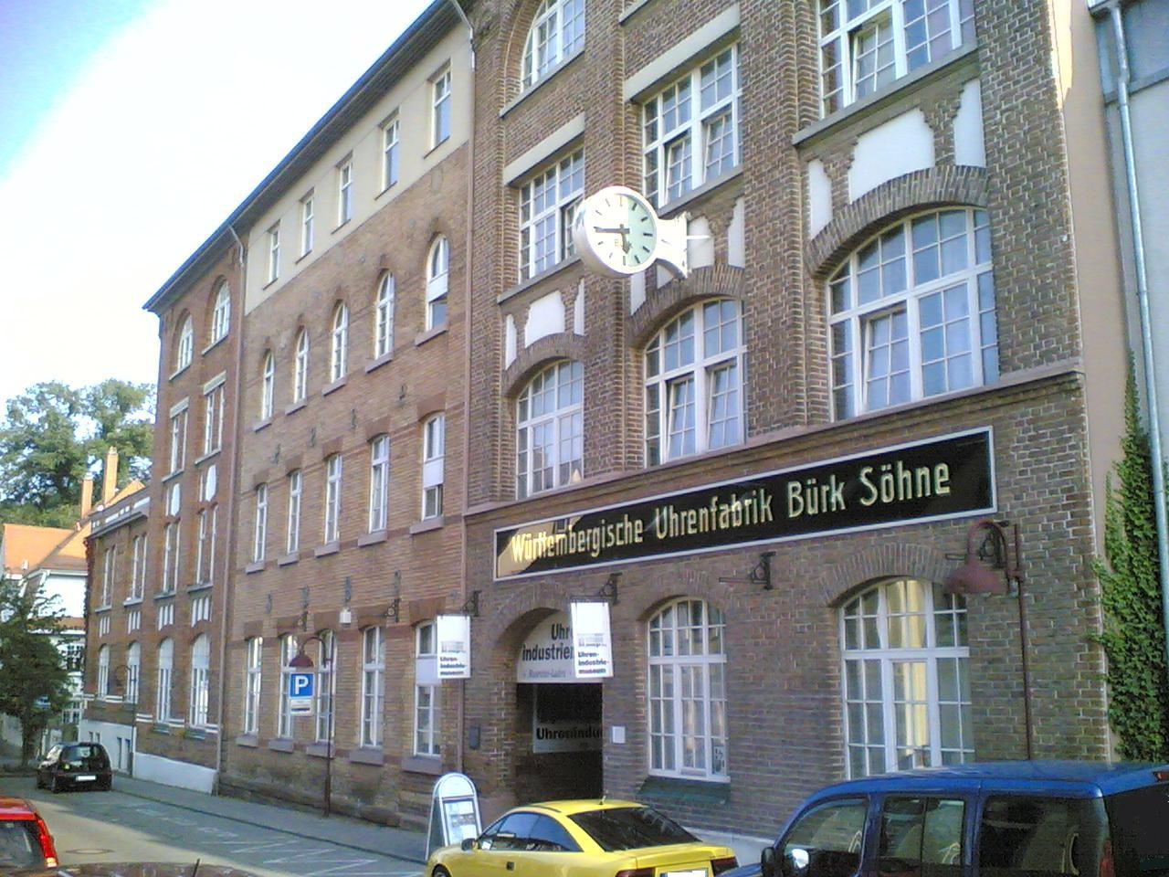 Ehemalige Württembergische Uhrenfabrik Bürk, heute Uhrenindustriemuseum, Villingen-Schwenningen